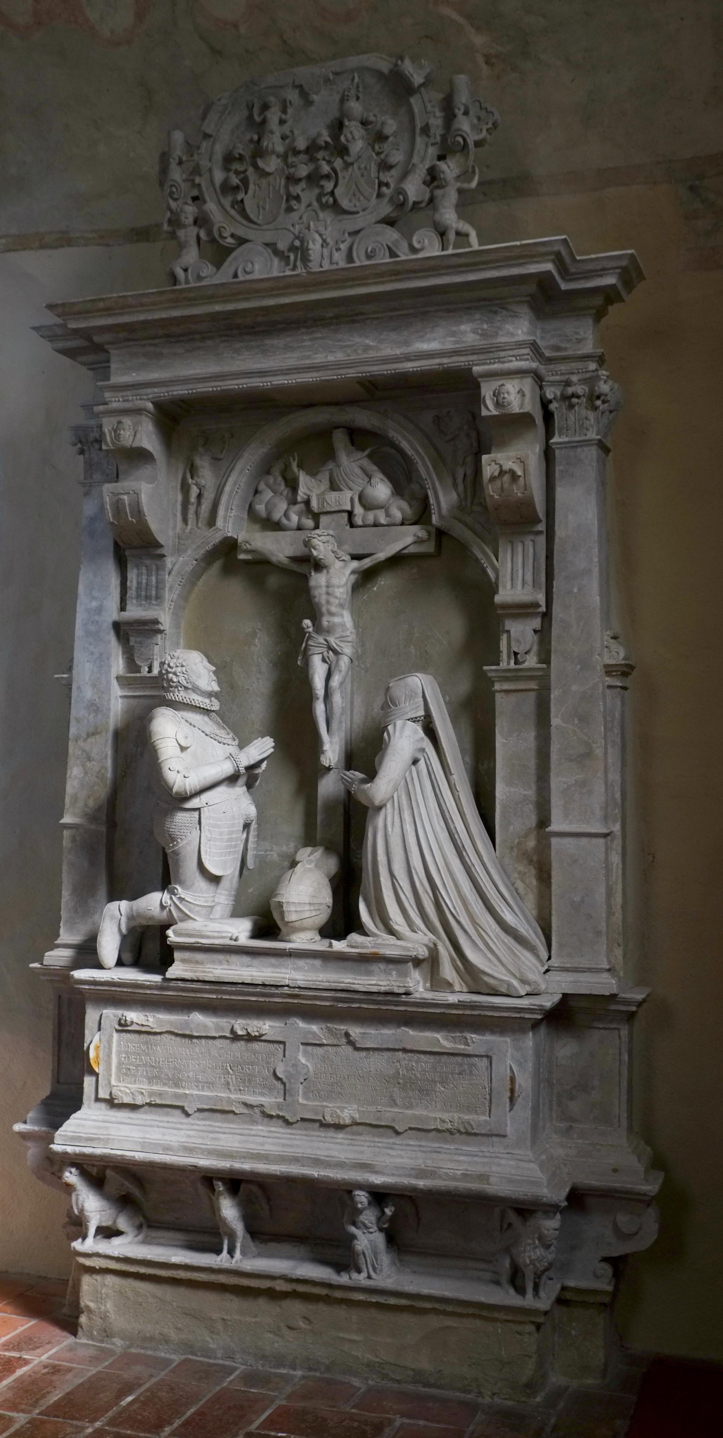 Epitaph in der evangelischen Marienkirche in Kocherstetten, einem Stadtteil von Künzelsau im Hohenlohekreis (Baden-Württemberg, Deutschland)